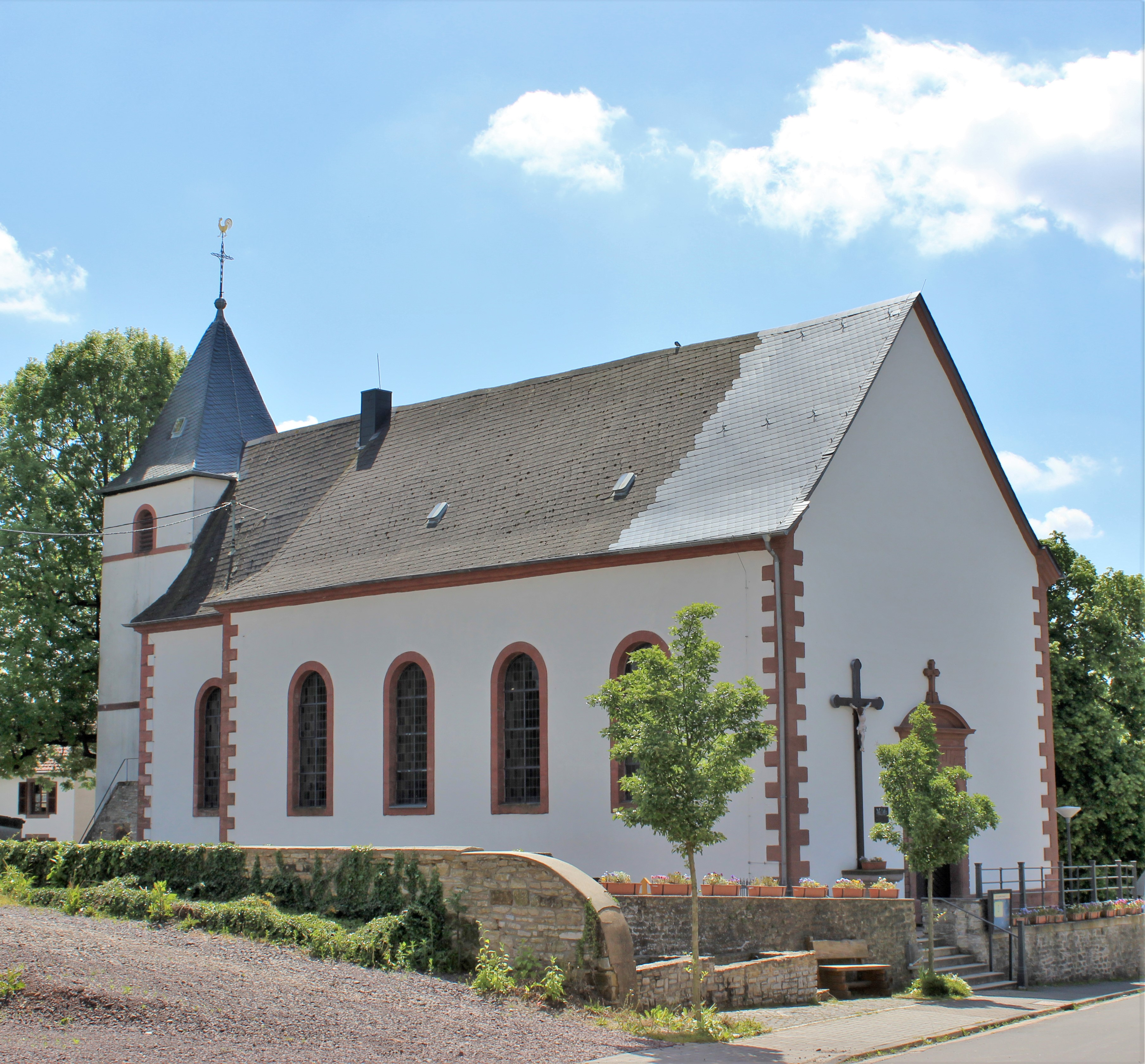 Die katholische Kirche St. Margaretha in Bedersdorf, Gemeinde Wallerfangen, Landkreis Saarlouis, Saarland